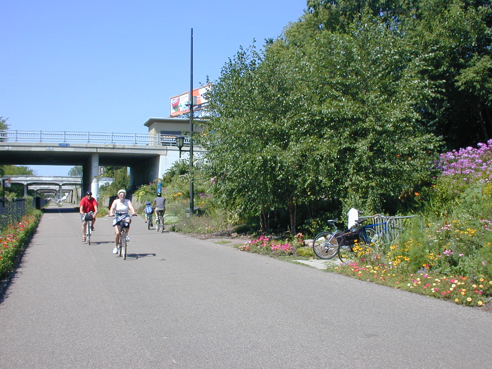 Greenway bike-walk trail